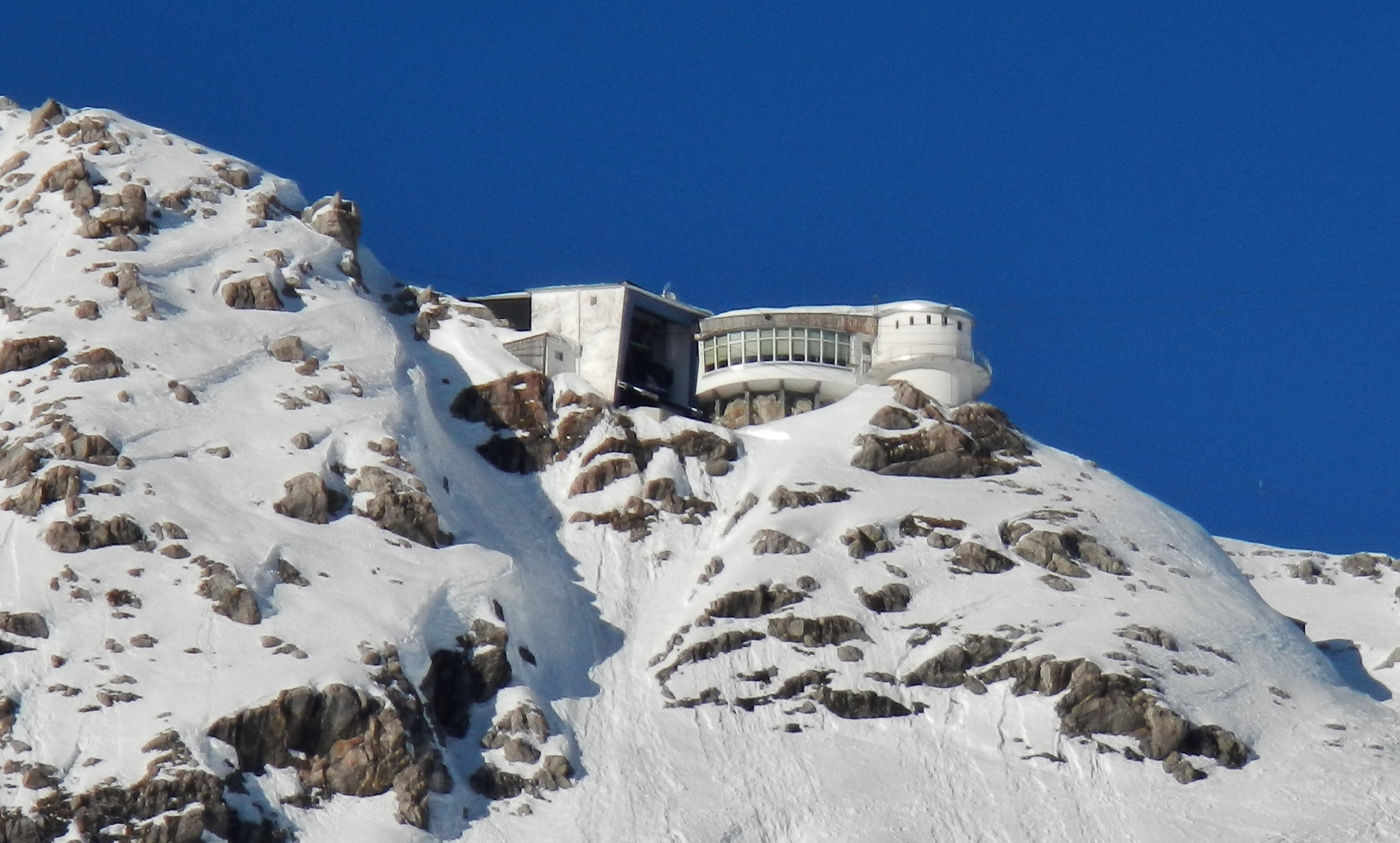 Restaurant Vallugagrat 2650 m